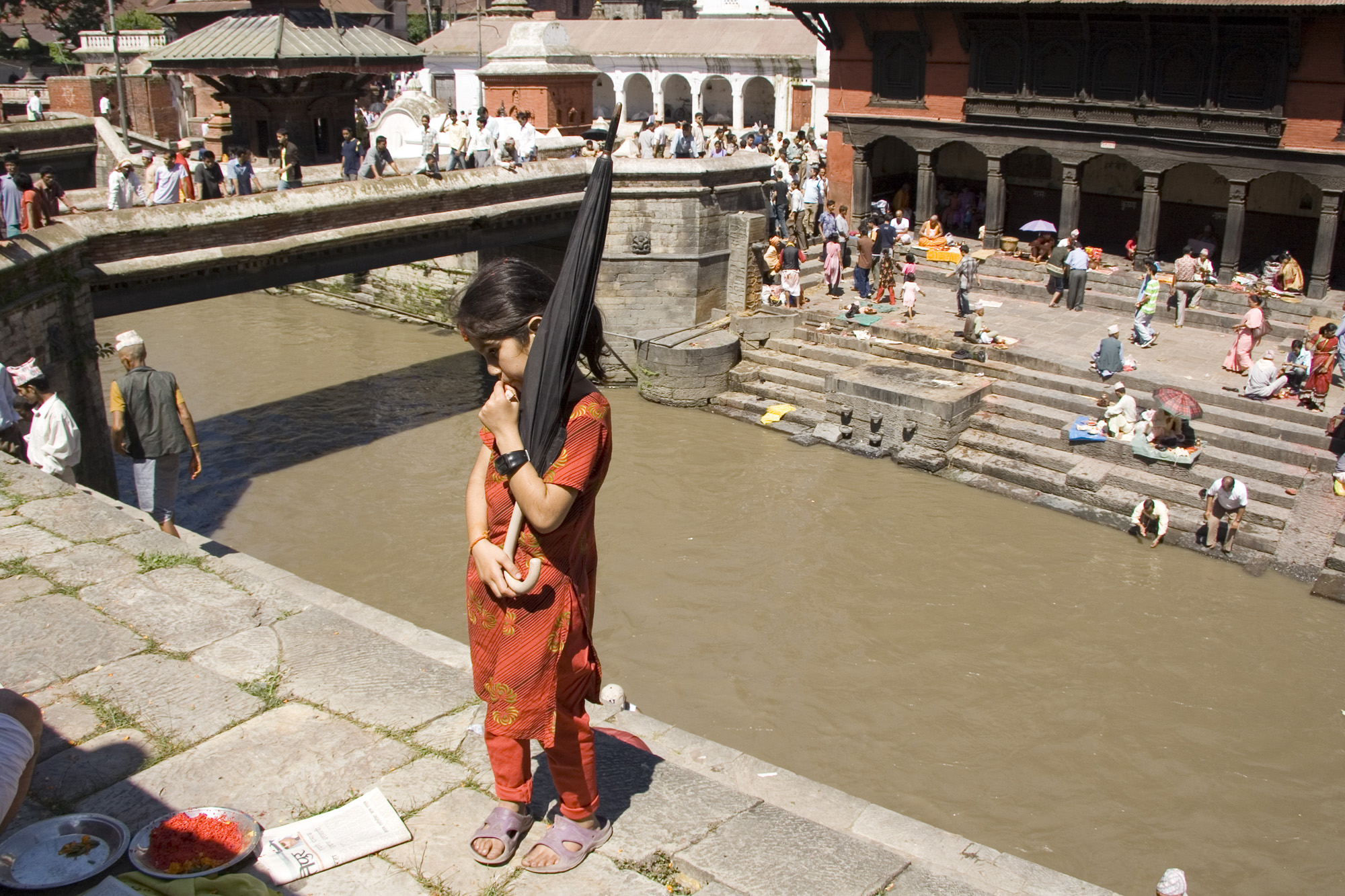 Pashupatinath temple in Kathmandu, Nepal